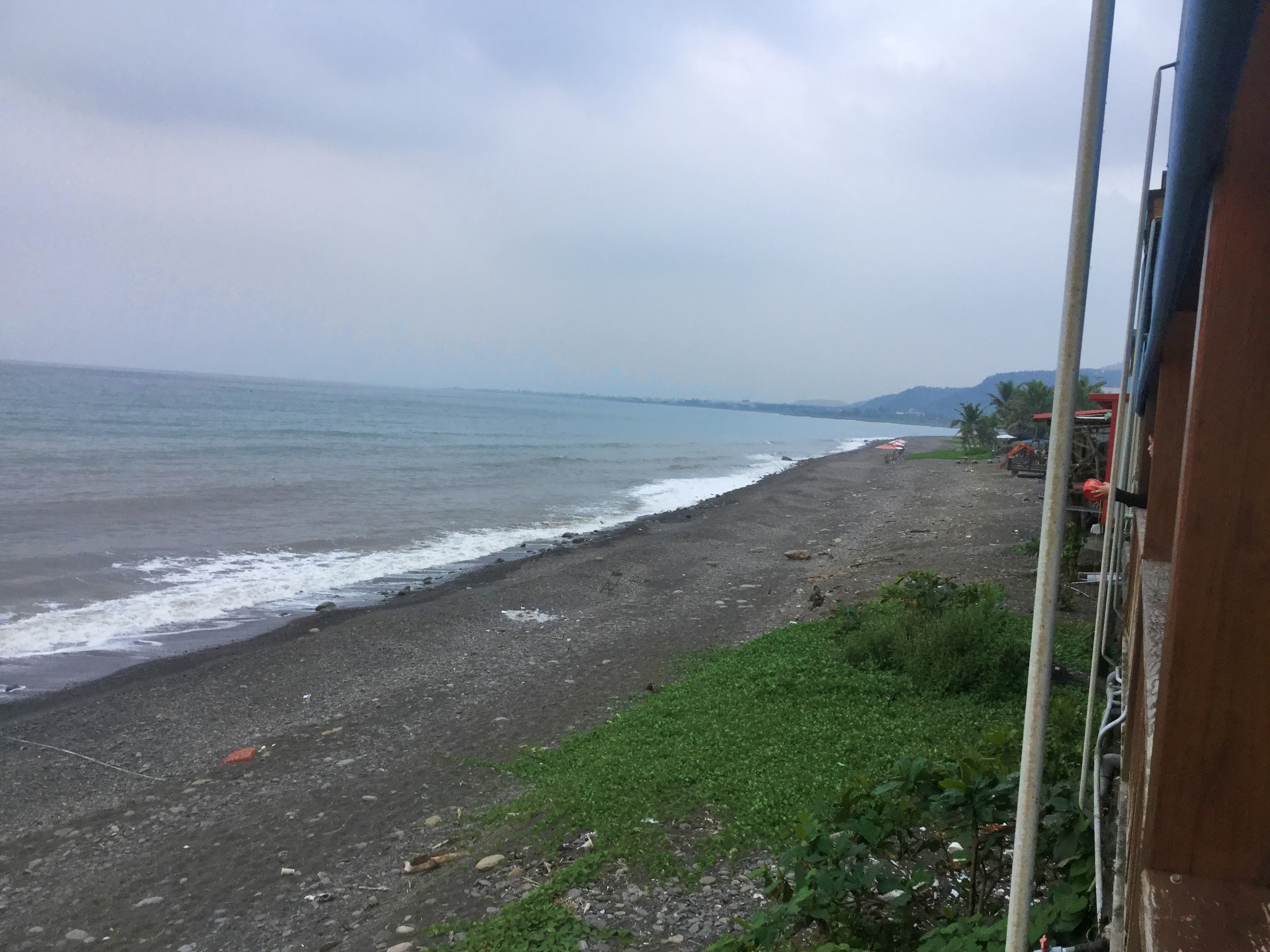 枋山鄉海岸拍照於南和路品味軒休息站